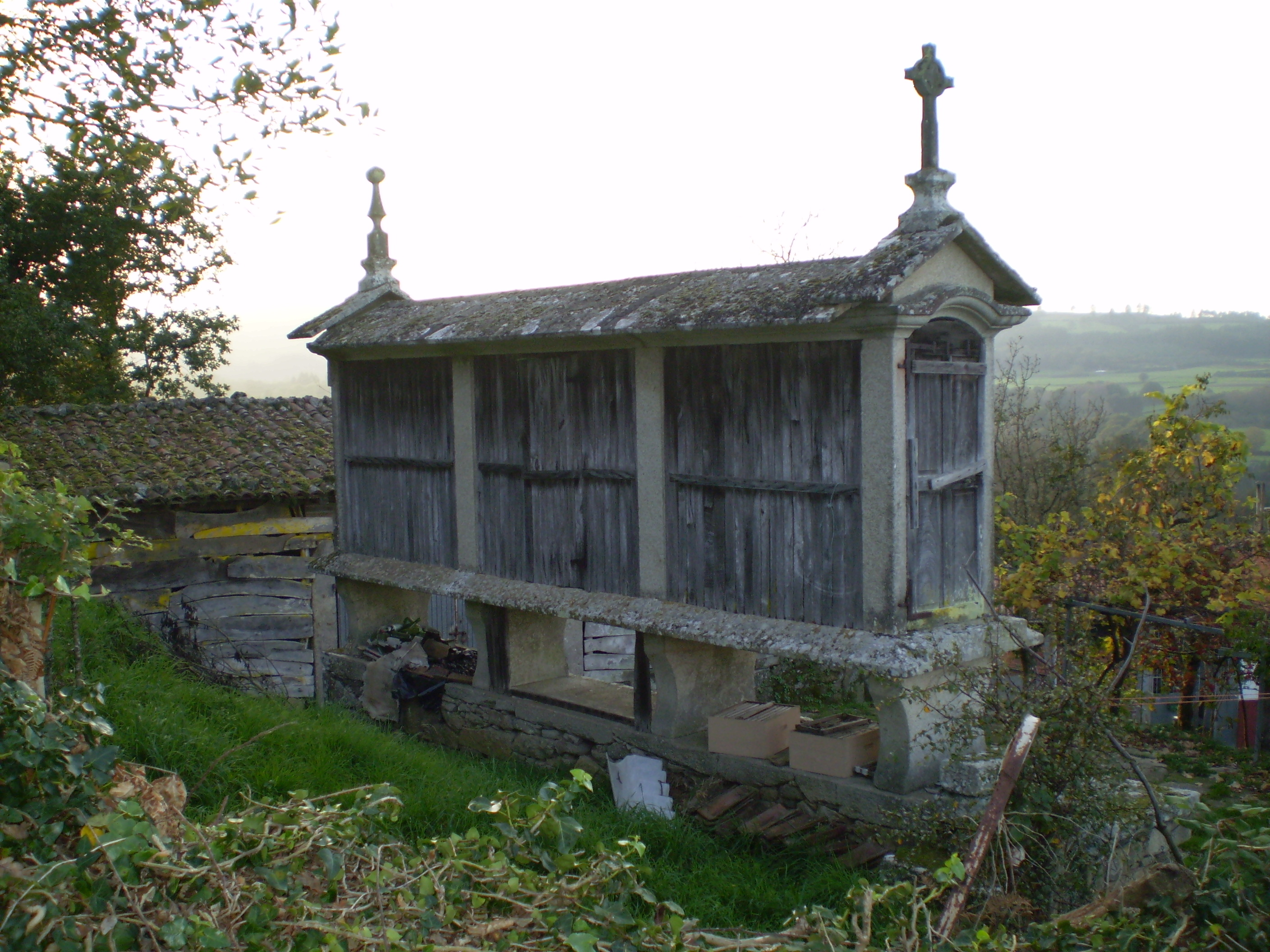 Hórreo en Penela (Antas de Ulla)